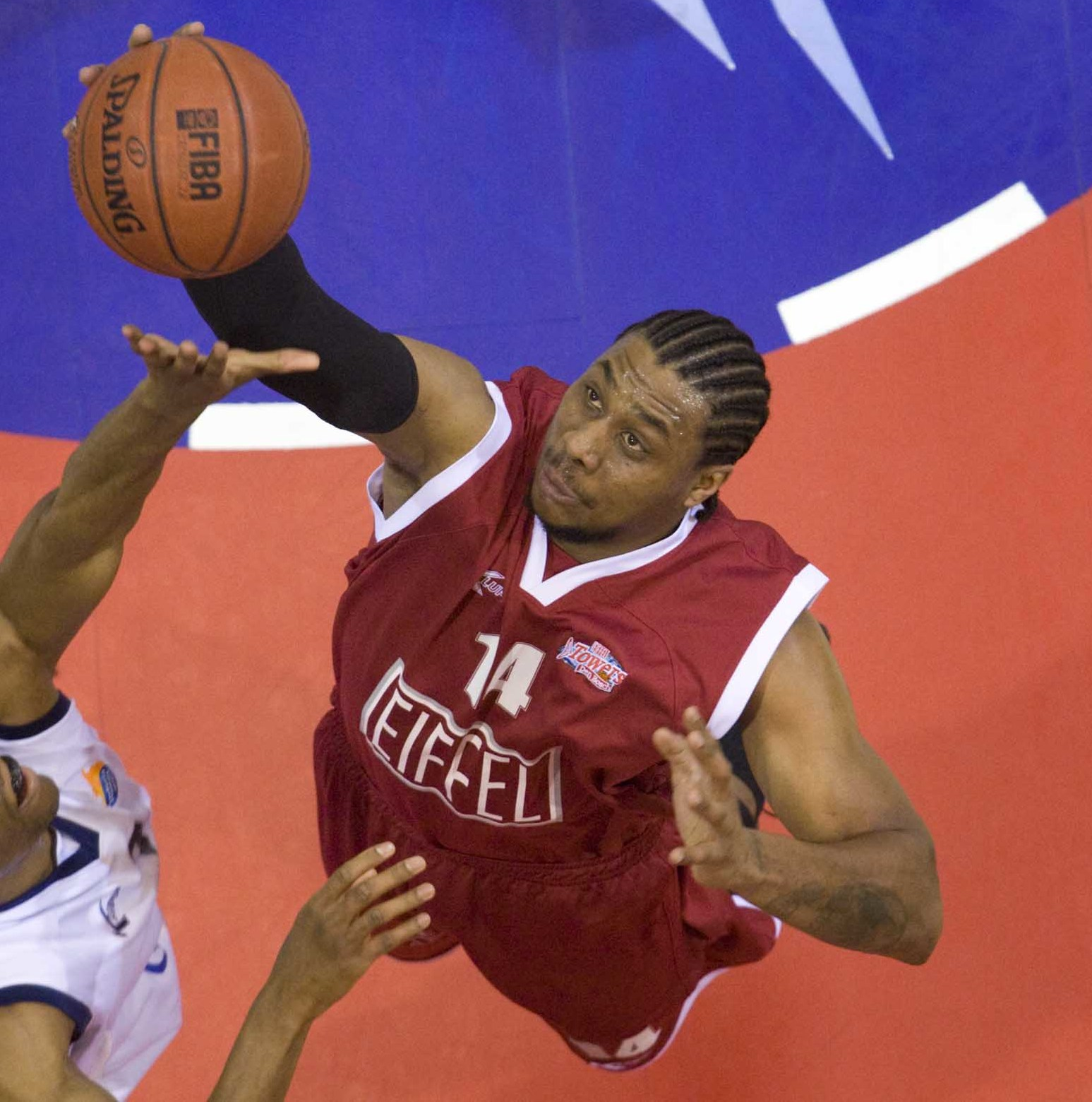 060210 GRONINGEN - basketbalwedstrijd tussen GasTerra Flames en de EiffelTowers uit Den Bosch Basketbalwedstrijd in de Dutch Basketball League tussen GasTerra Flames en EiffelTowers Den Bosch.